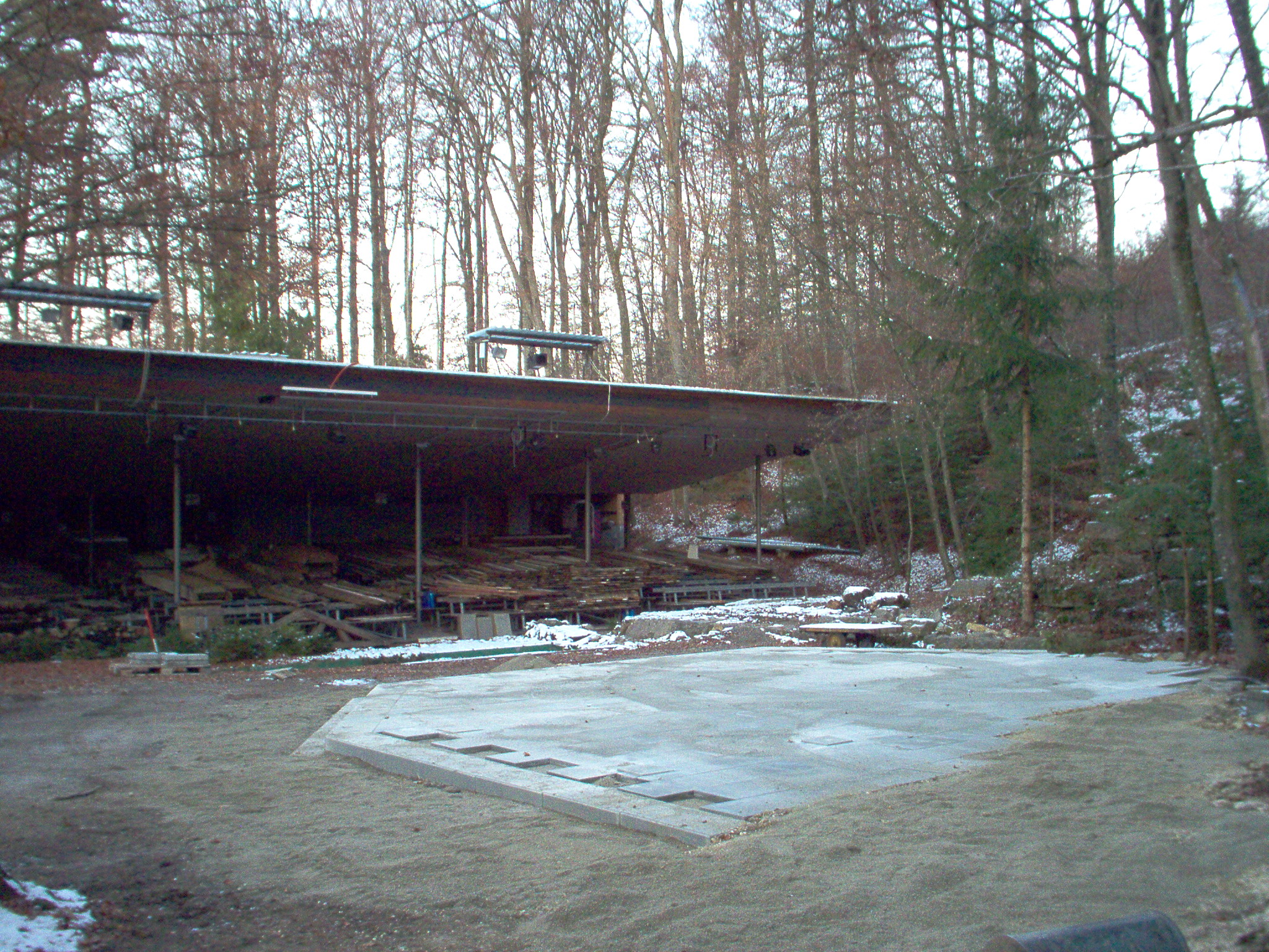 Waldbühne Sigmaringendorf (wood stage Sigmaringendorf), during winter